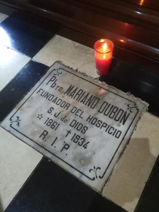 Lápida del Pbro. Mariano Dubón, con el año de su nacimiento erróneamente fechado.